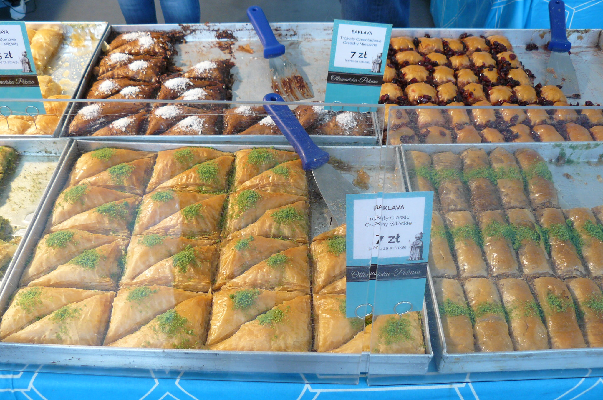 Bakława na targach Smaki Regionów, Poznan, 2015r.